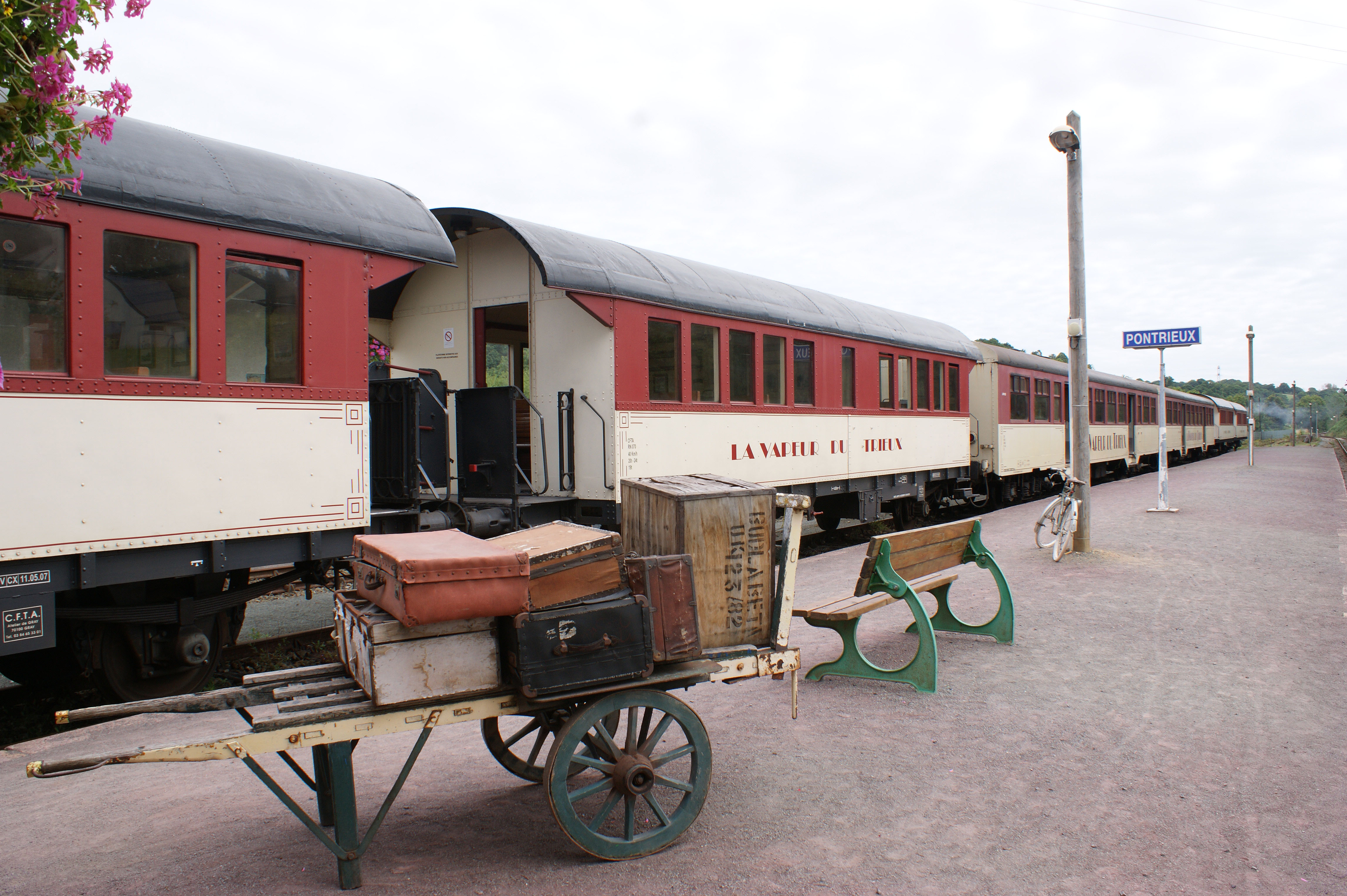 Le quai central avec les voitures de la Vapeur du Trieux en attente du départ pour le retour vers Paimpol.